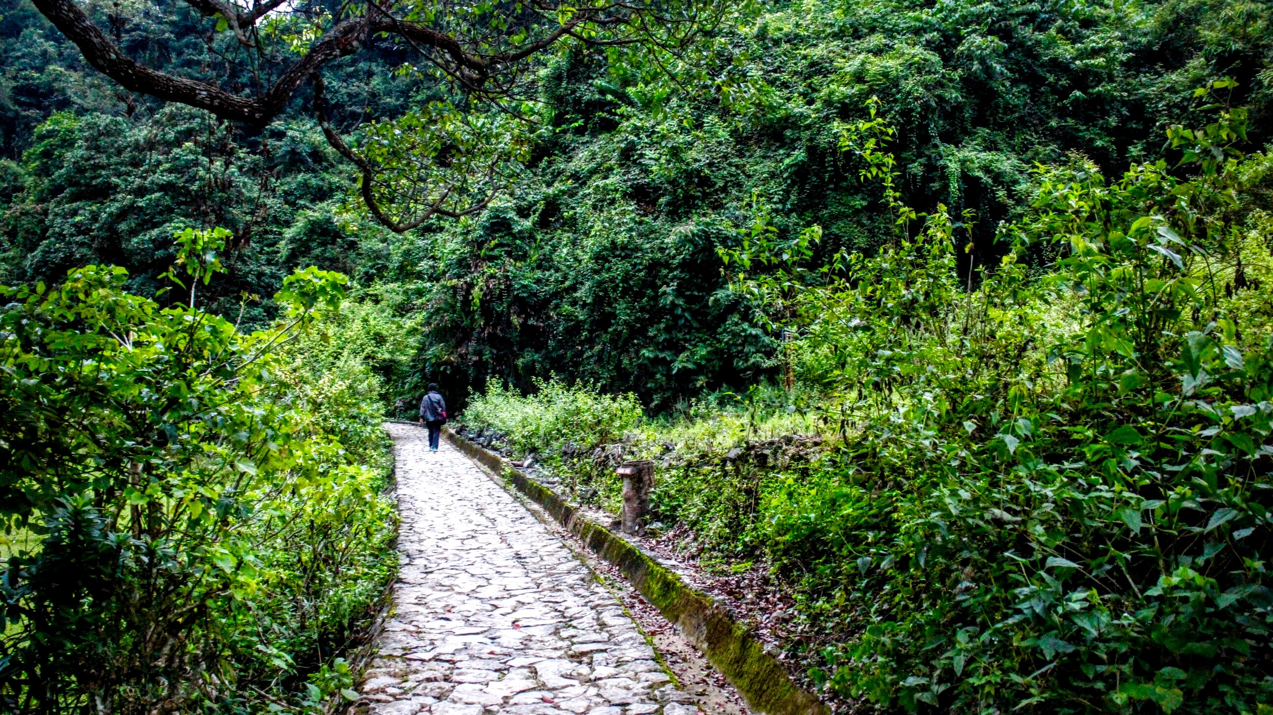 Duong vao Hang Coc po,Truong ha, Ha quang, Cao bang, Việt Nam!